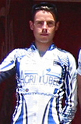 Mickaël Buffaz. Agritubel, Euskal Bizikleta 2005